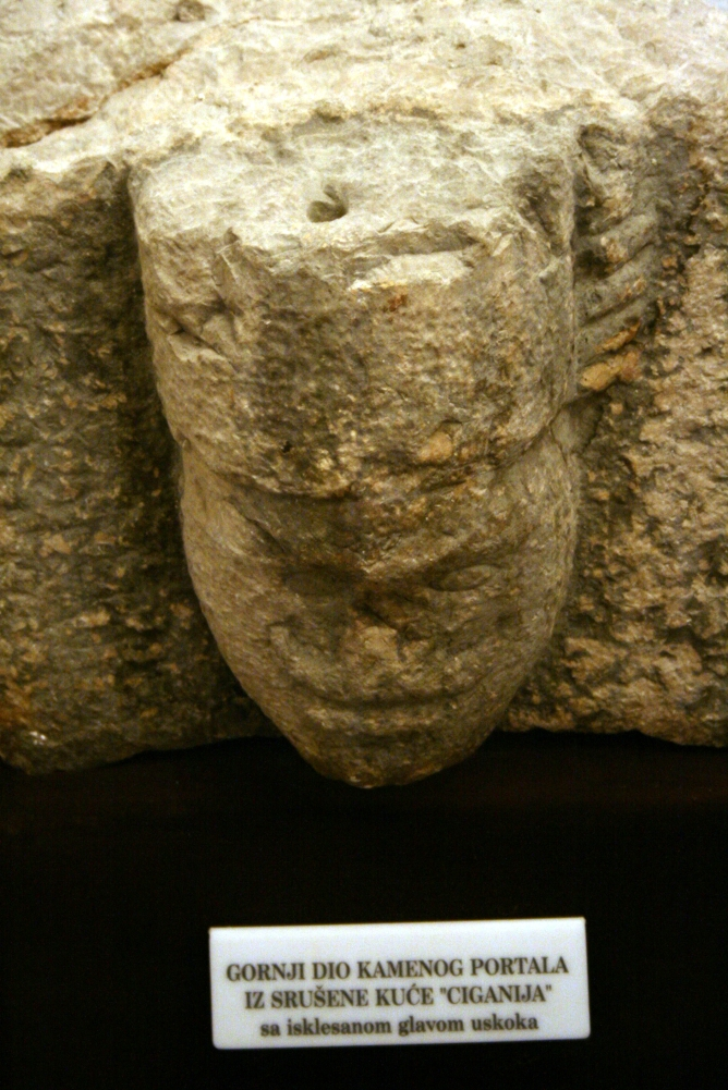 kamena glava Uskoka u Novom Vinodolskom